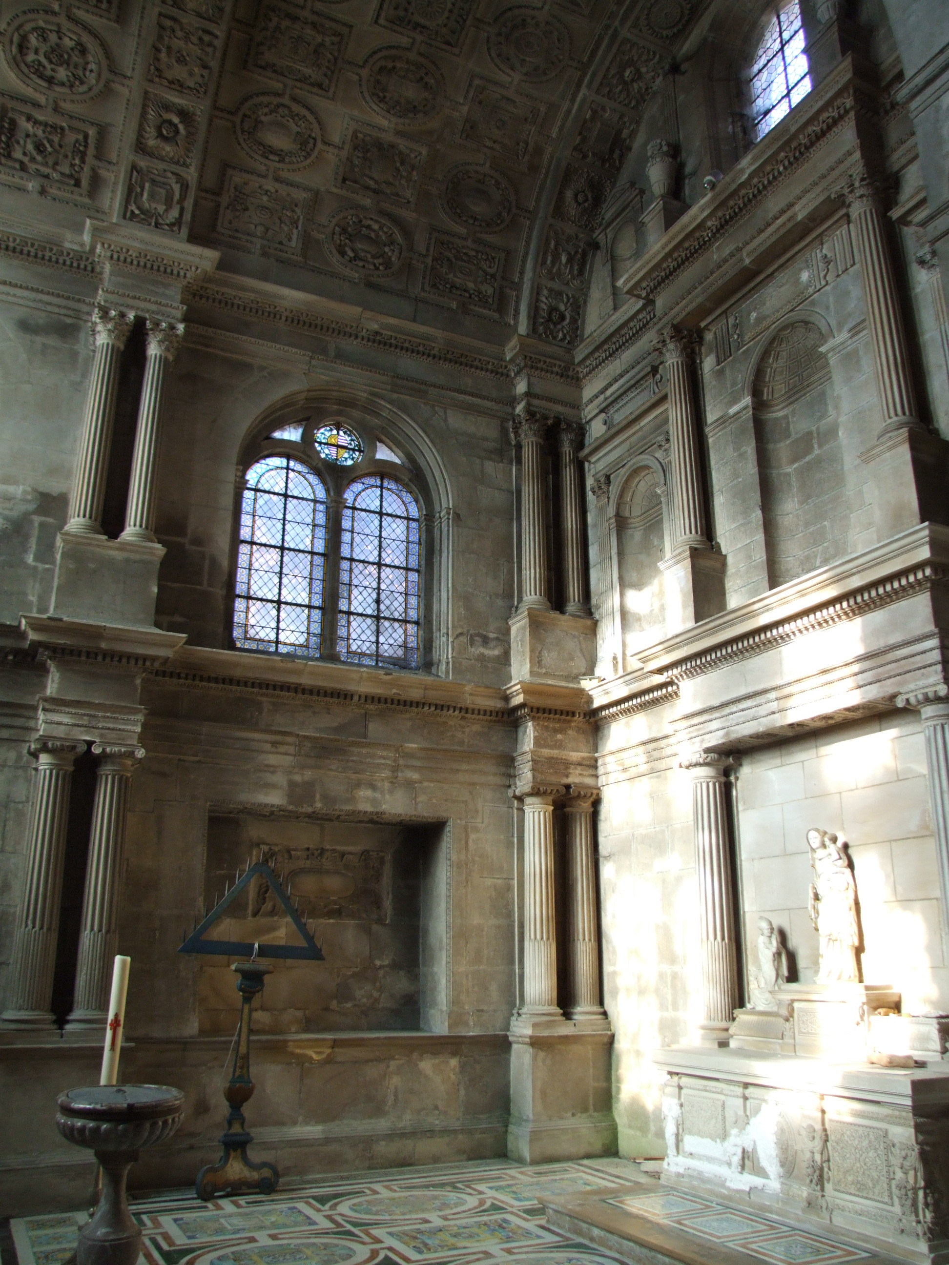 Cathédrale Saint-Mammès de Langres, FRANCE